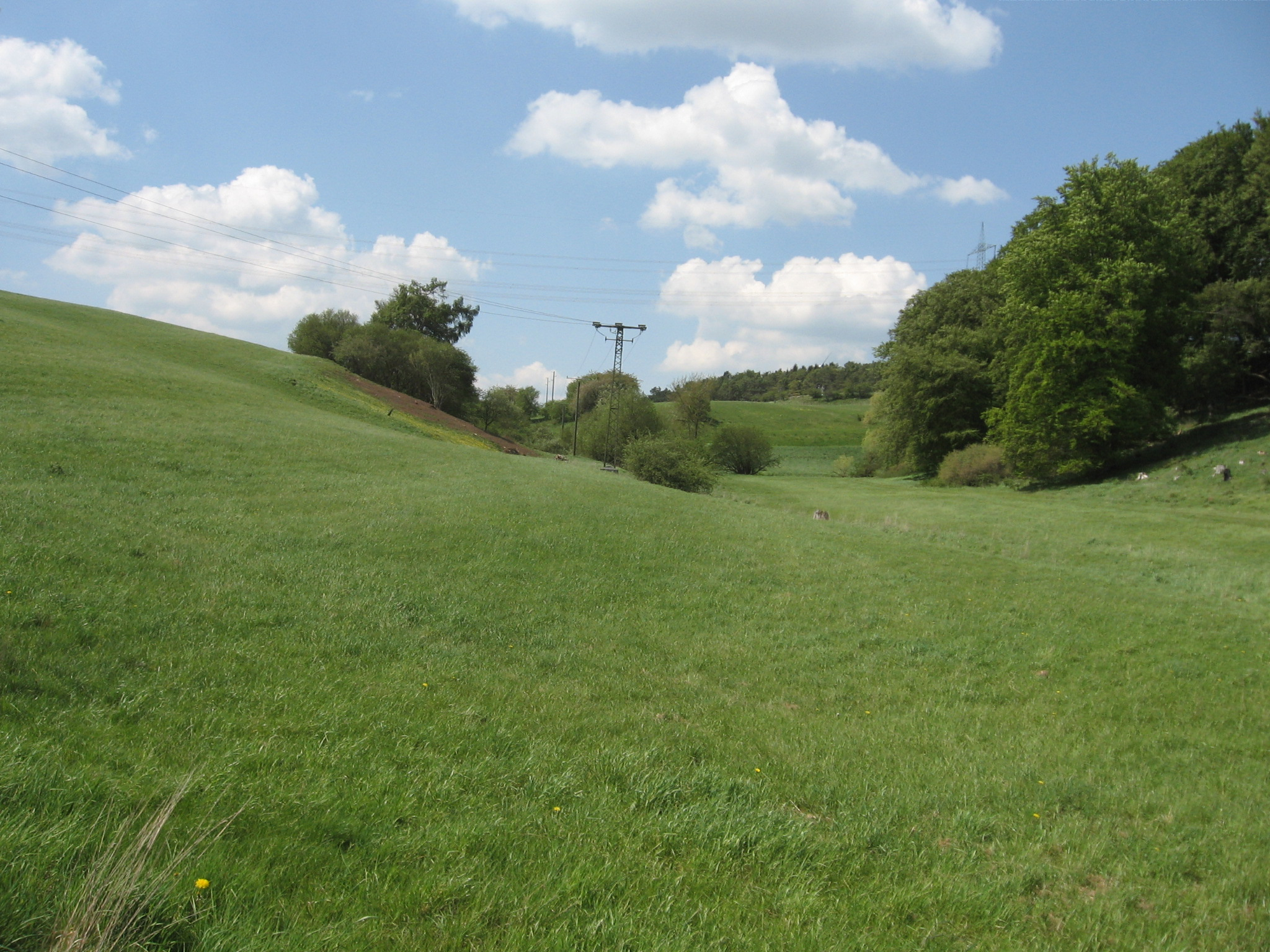 Westliche Bereich vom NSG Hummelgrund.